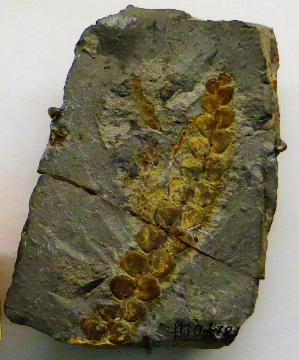 Fossil of Otozamites, an extinct plant- Took the photo at Museo di Storia Naturale di Verona